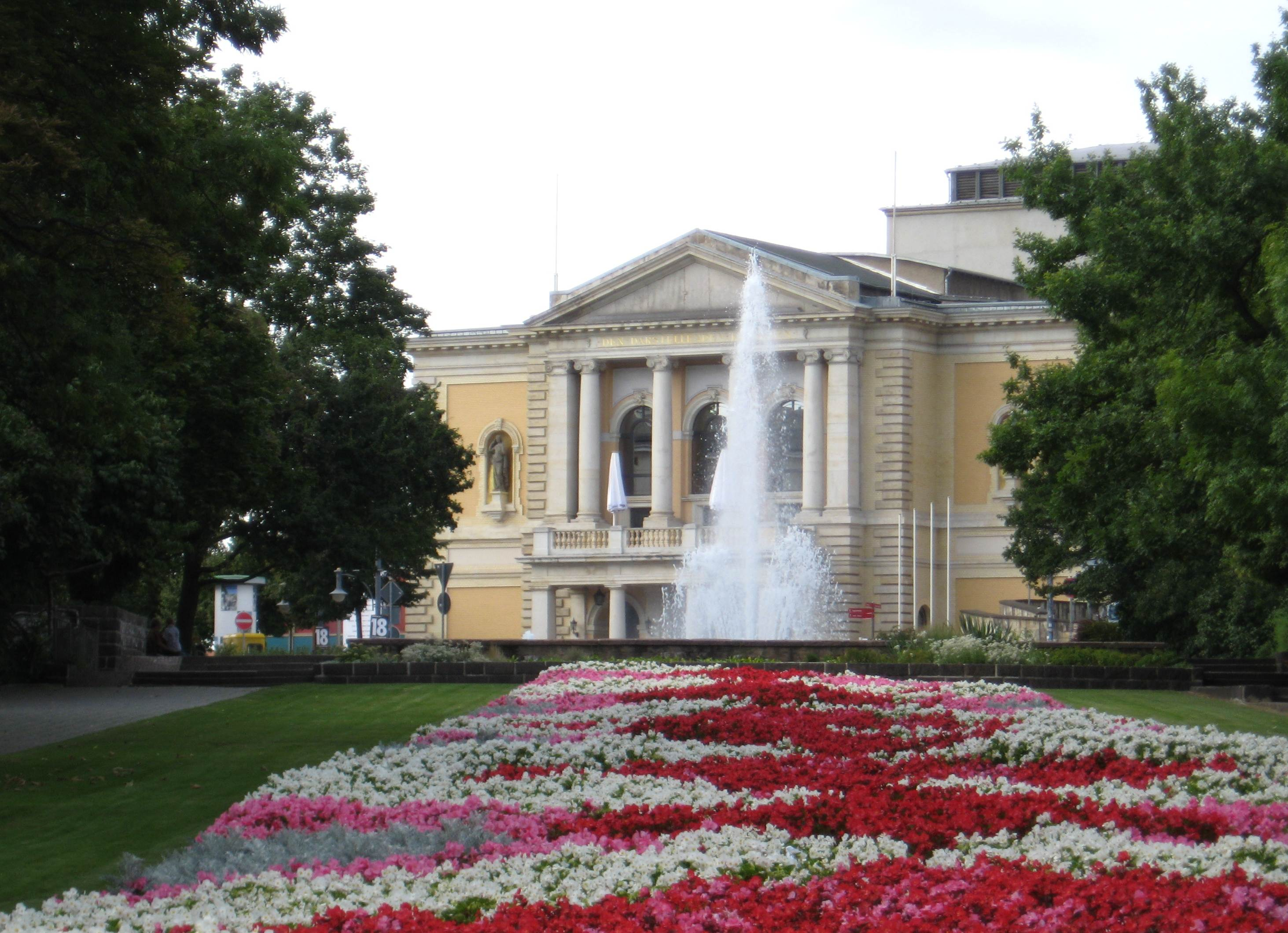 Das Opernhaus in Halle (Saale) am Joliot-Curie-Platz